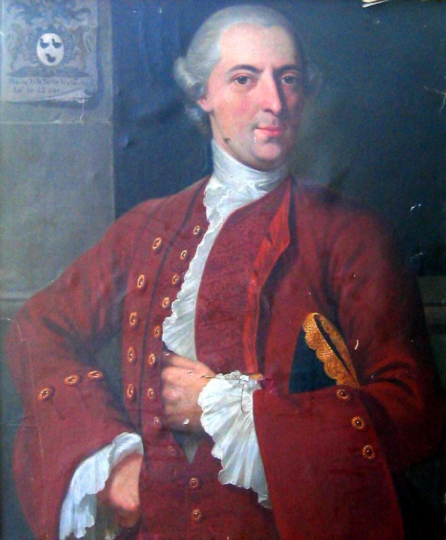 Portrait en buste de Raoul III de LA BARRE de NANTEUIL (1715-1794), garde du corps du roi Louis XV en la compagnie écossaise, huile sur toile, École française du XVIIIe siècle.